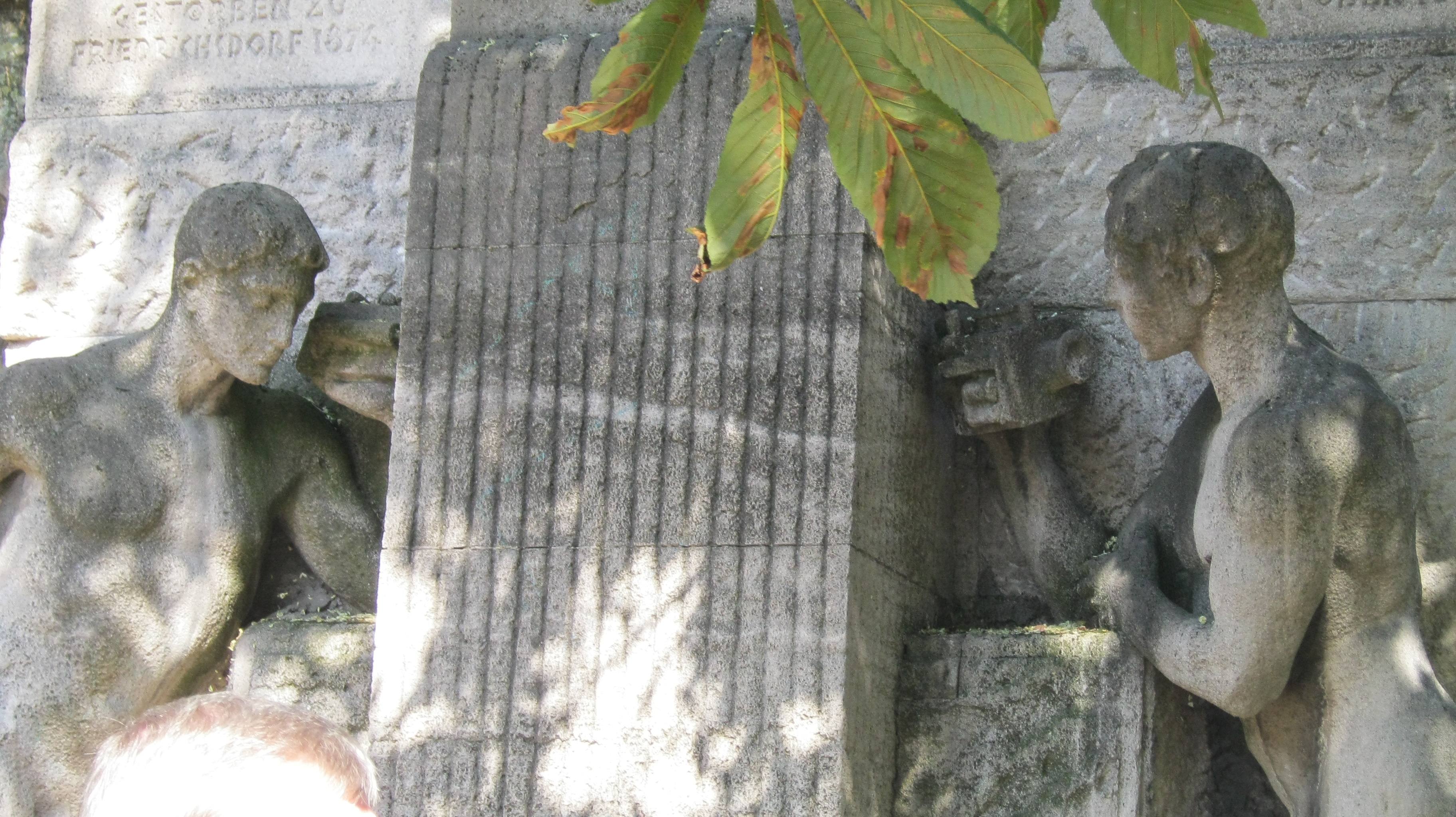 Ein Denkmal für Johann Philipp Reis, den offiziellen Erfinder des Telefons in der Eschersheimer Anlage, Frankfurt am Main